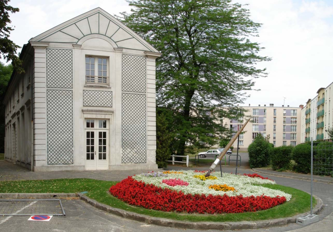 L'orangerie du Val-ombreux de Soisy-sous-Montmorency, Val-d'Oise (France)